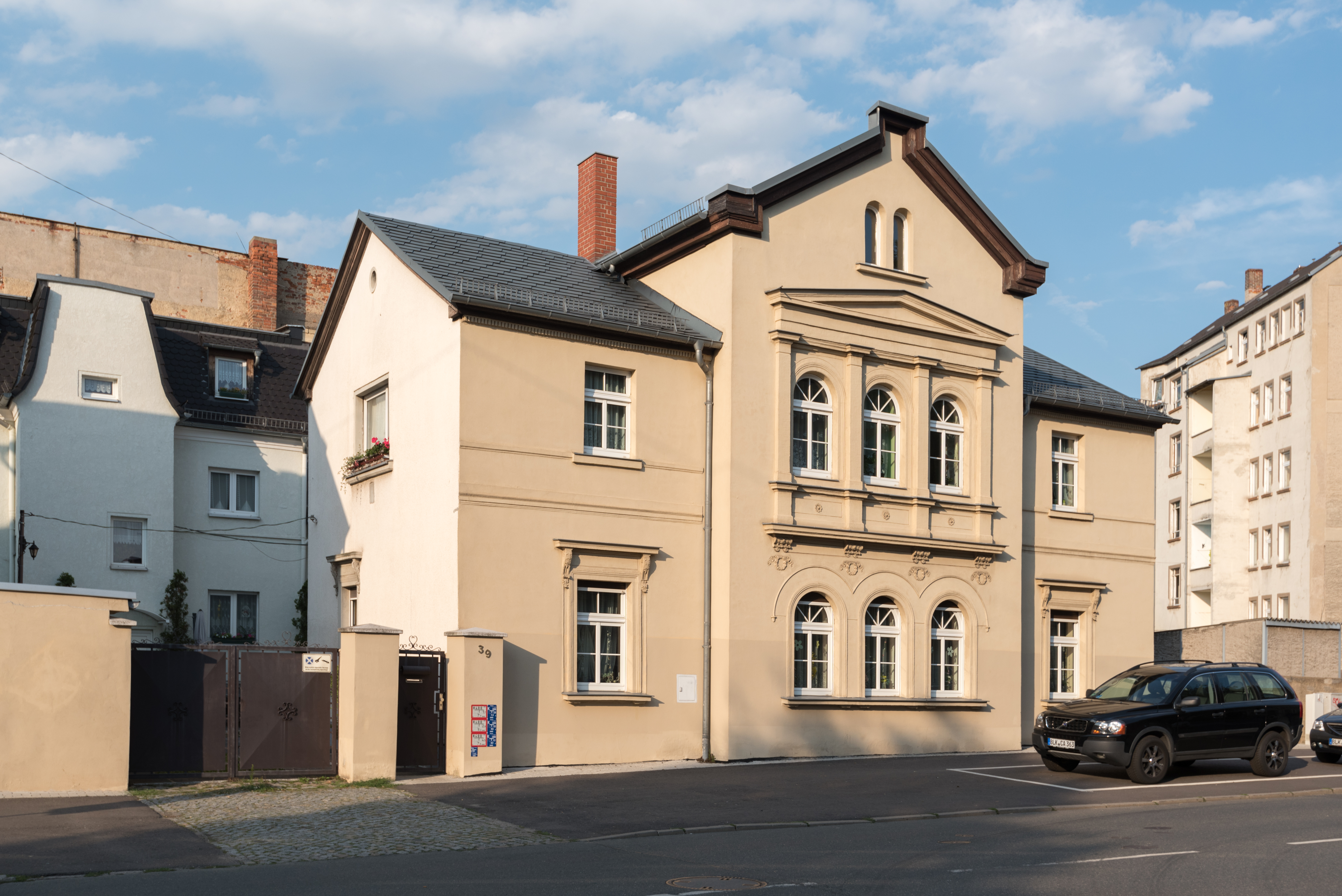 Zeitz, Altenburger Straße 39